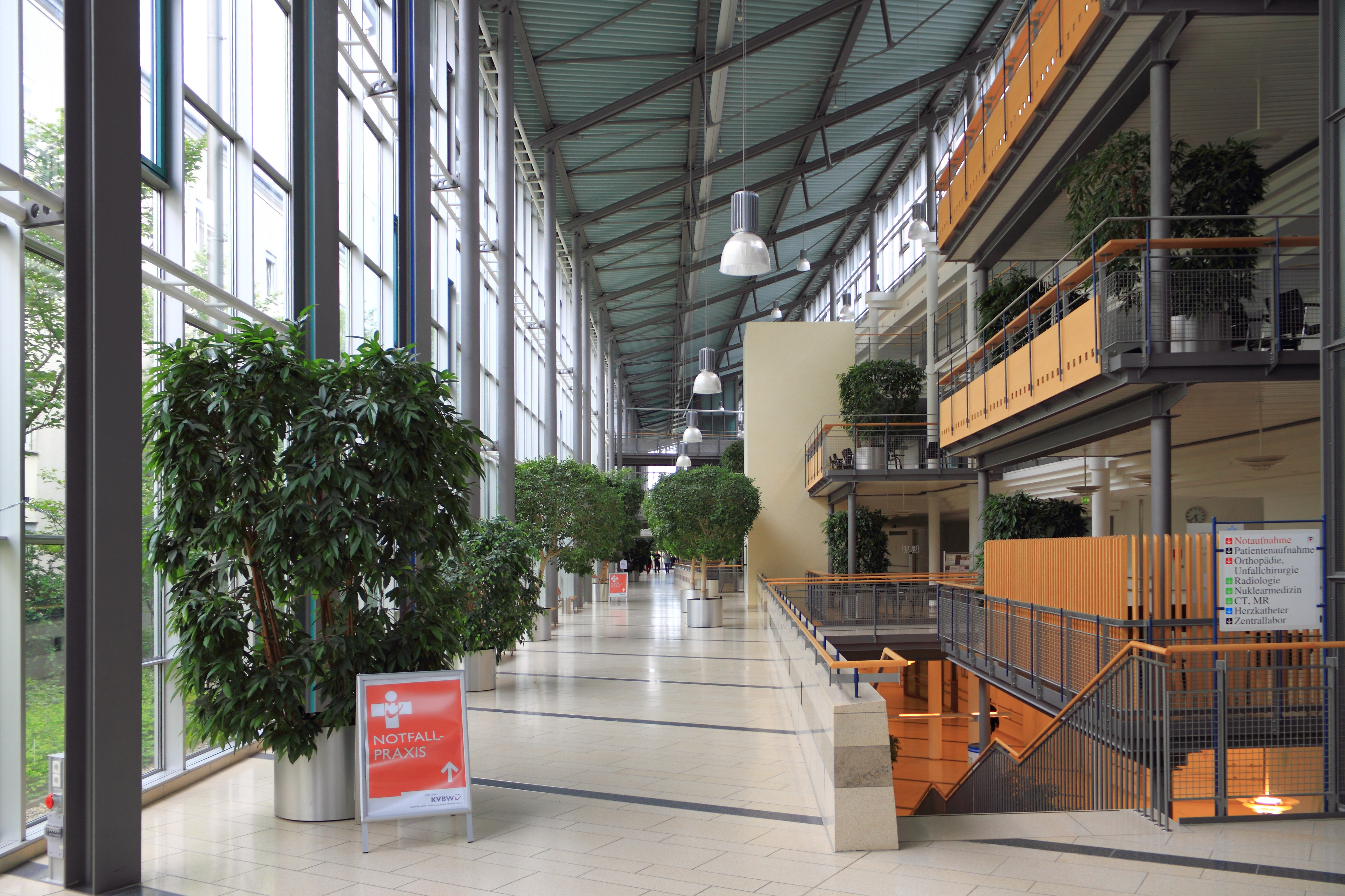 Das Caritas-Krankenhaus in Bad Mergentheim, die große Eingangshalle.